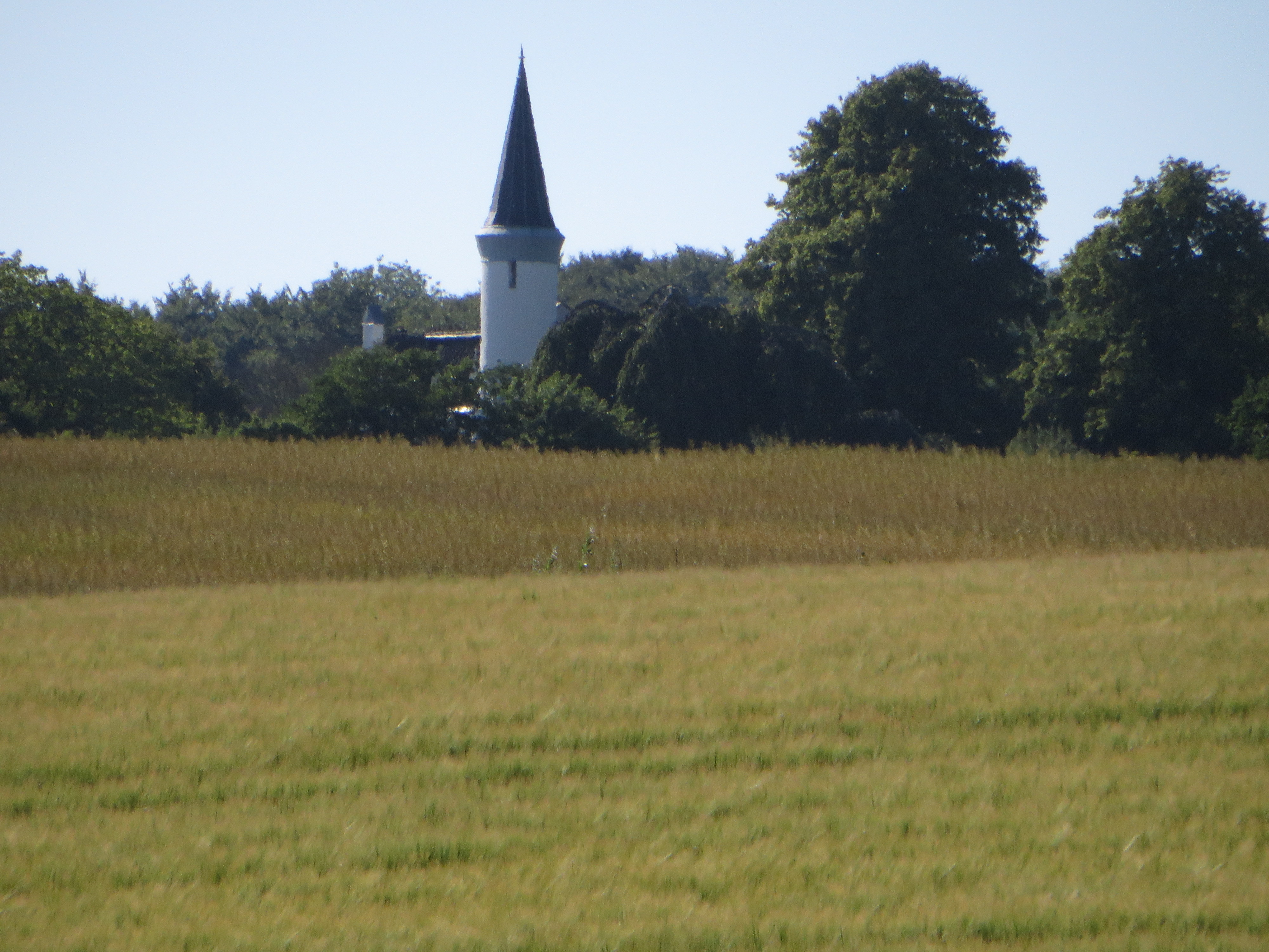 Hof Buskmose aus der Ferne (Region der Flensburger Förde 3 Juli 2018), Bild 01